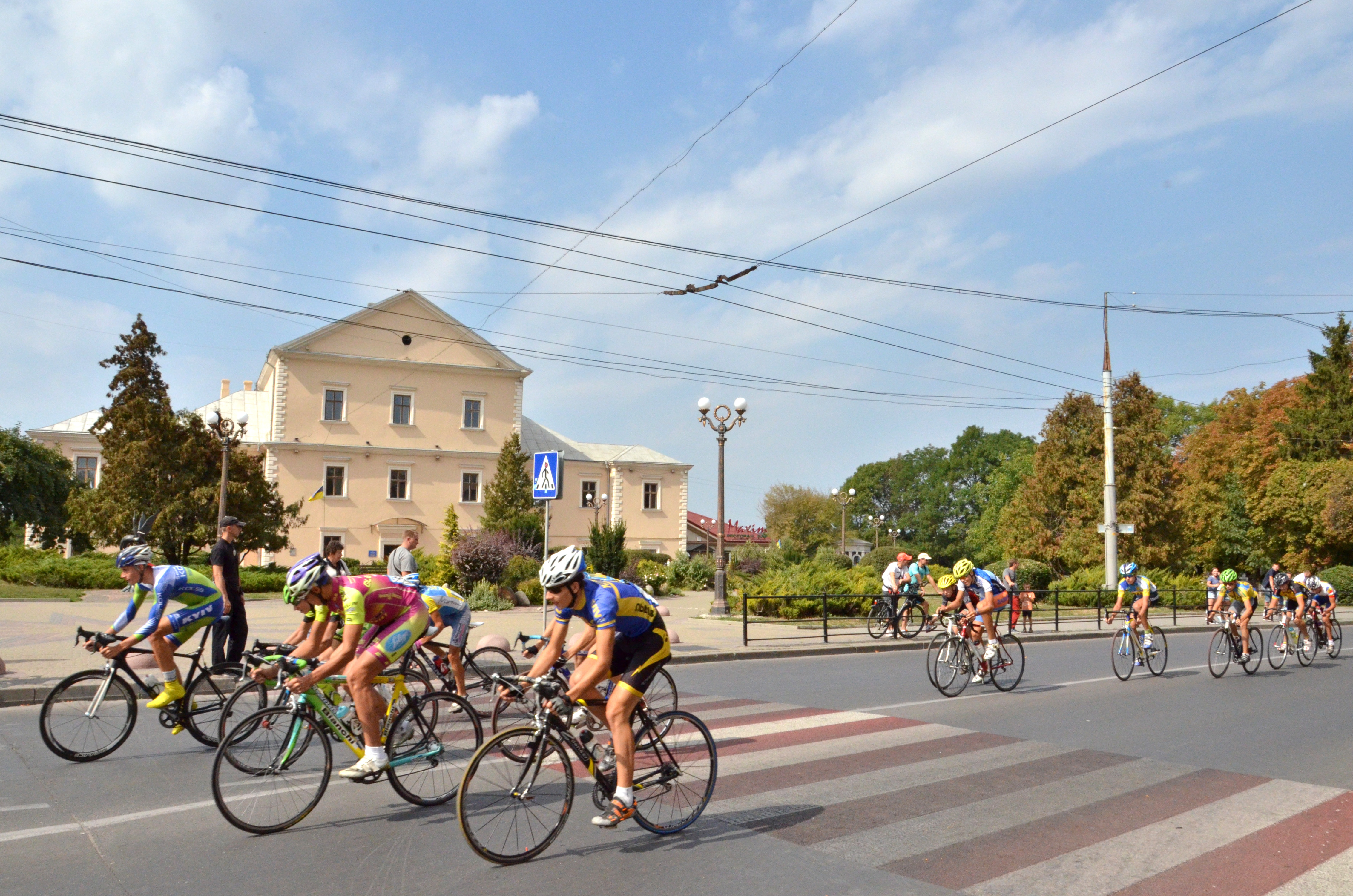 Всеукраїнські велосипедні перегони пам'яті майстра спорту Володимира Філіпенка. На тлі — пам'ятка архітектури Старий замок, Тернопіль, вул. Замкова, 12